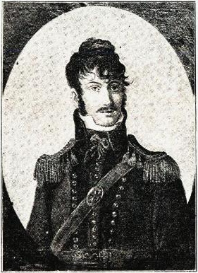 «Ludvig Mariboe. Efter et Maleri.»